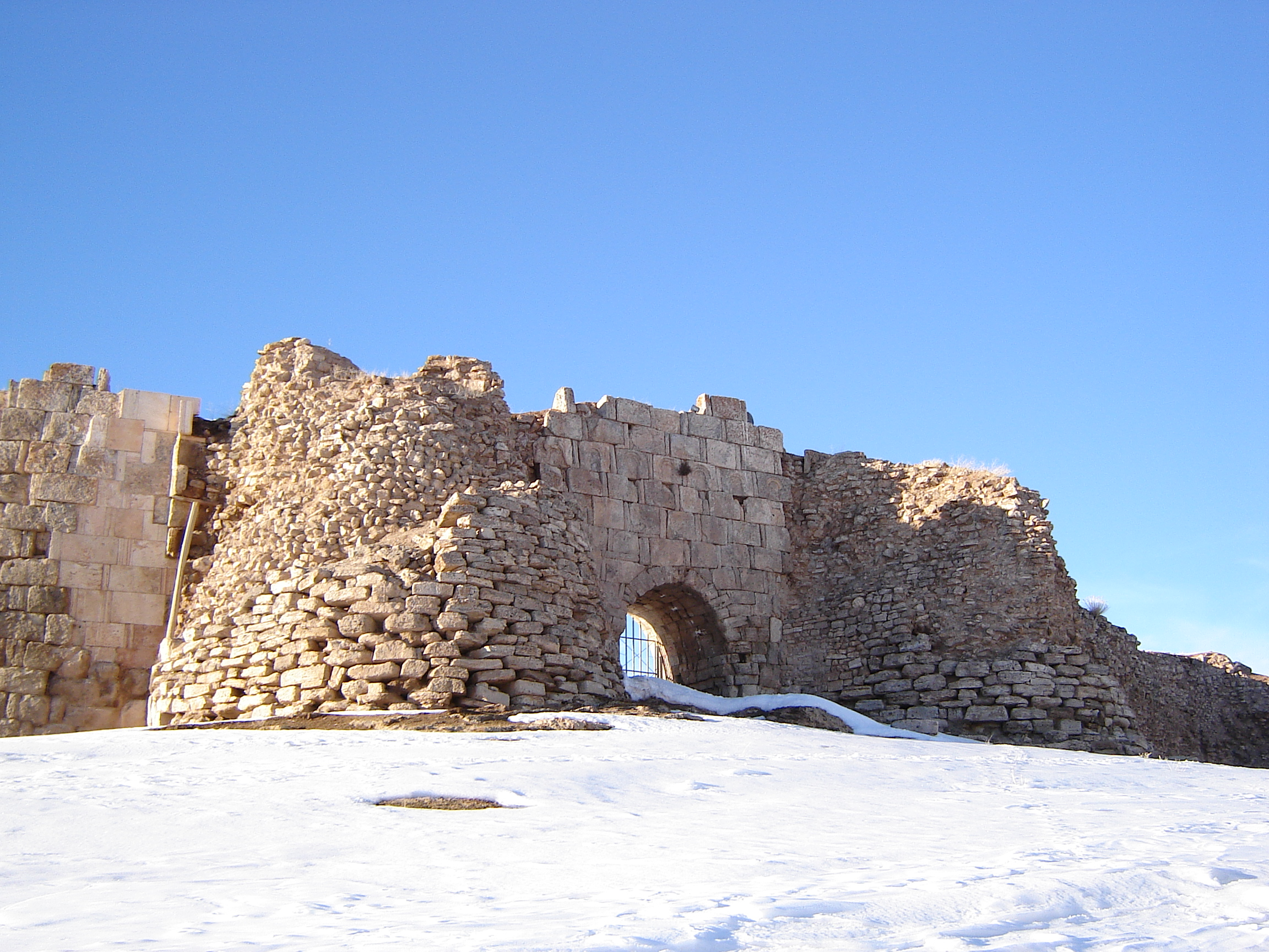 دروازه مجموعه تخت سلیمان